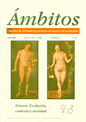 Fotografía de la portada del número 1 de la Revista Ámbitos